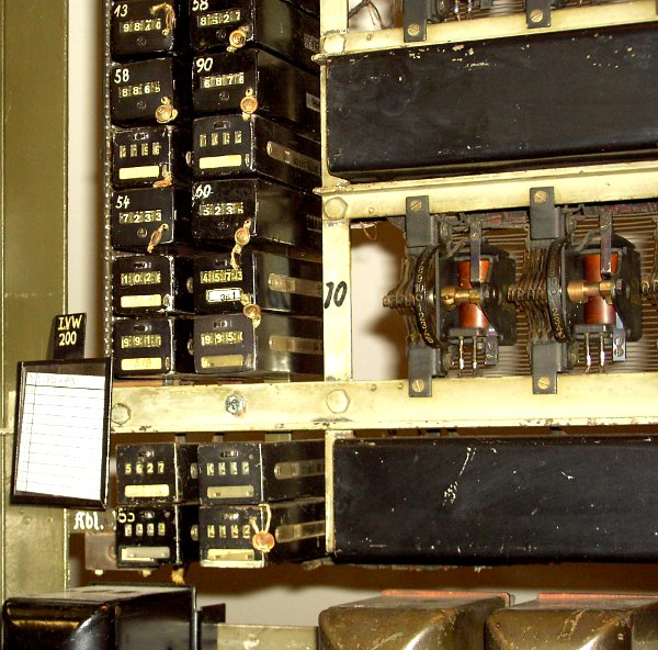 System 22, Vorwähler mit Gebührenzähler auf der linken Seite